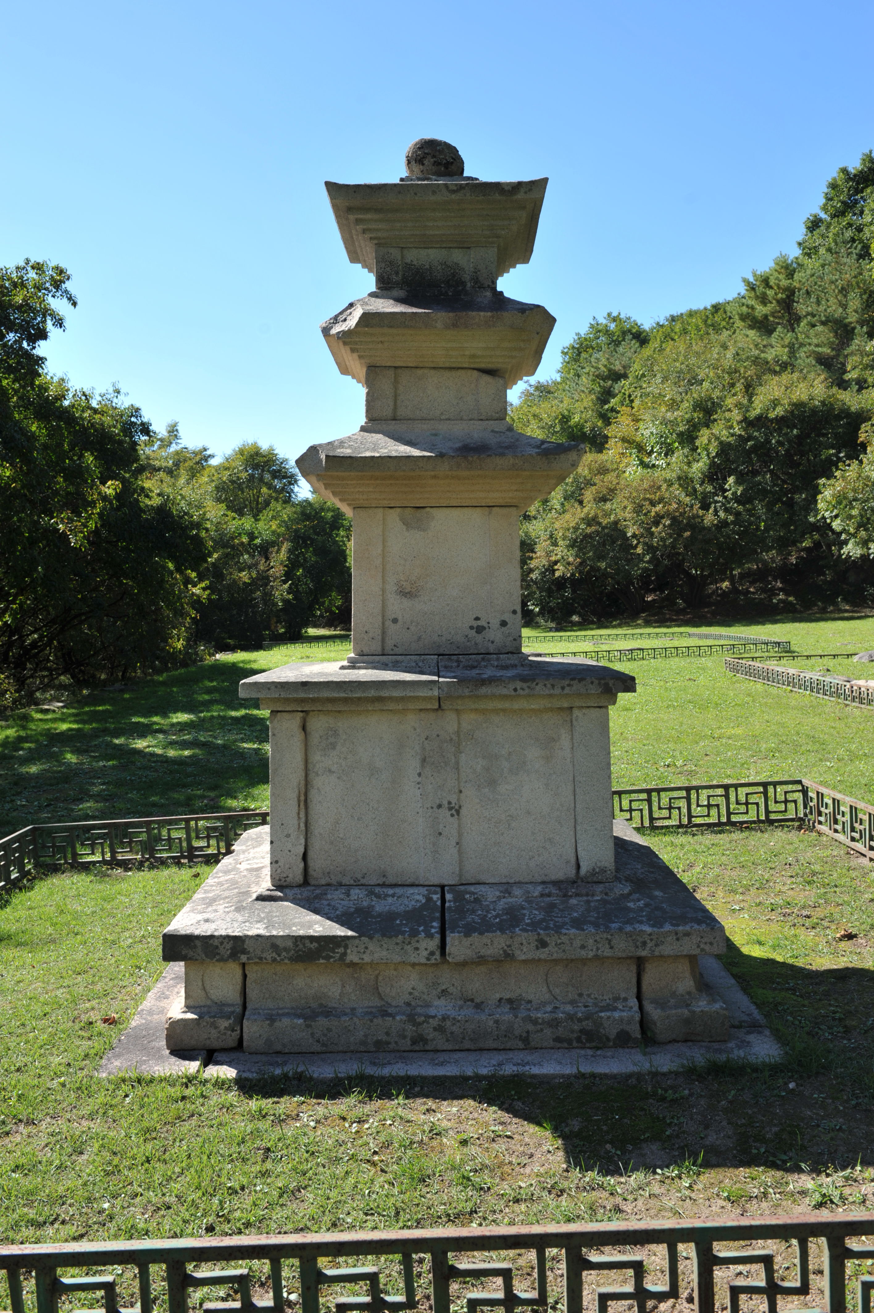 한계사지 남 삼층석탑